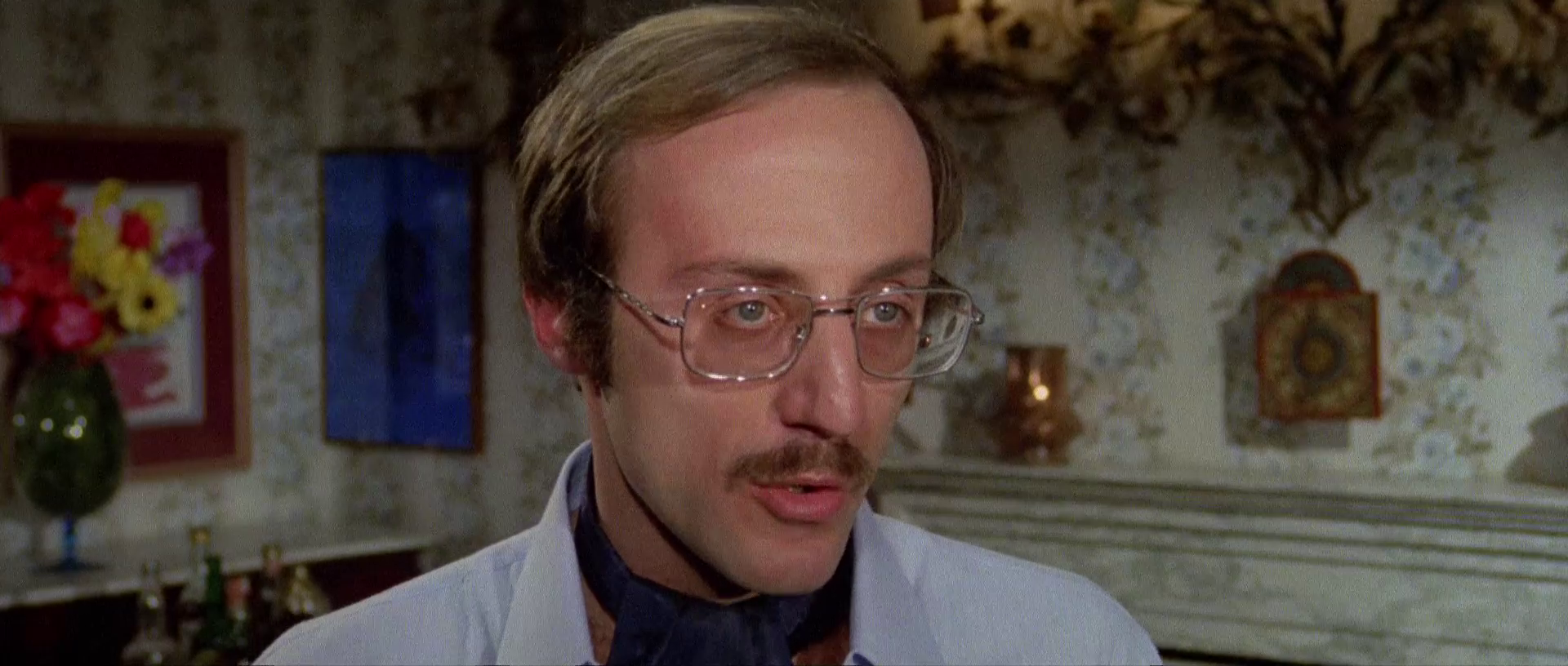 Scena dal film Milano odia: la polizia non può sparare (1974)